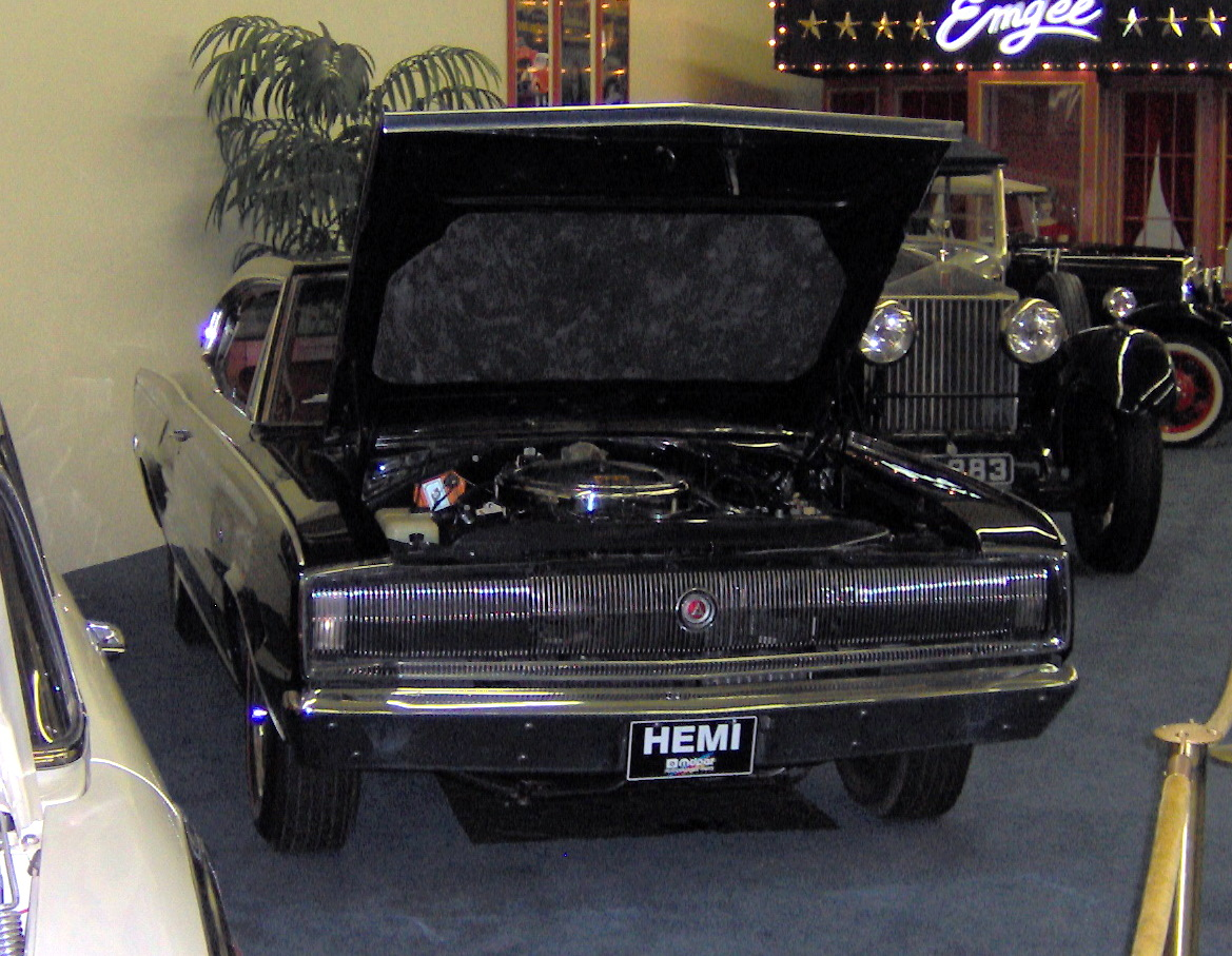 1966 Dodge Charger 426 Hemi